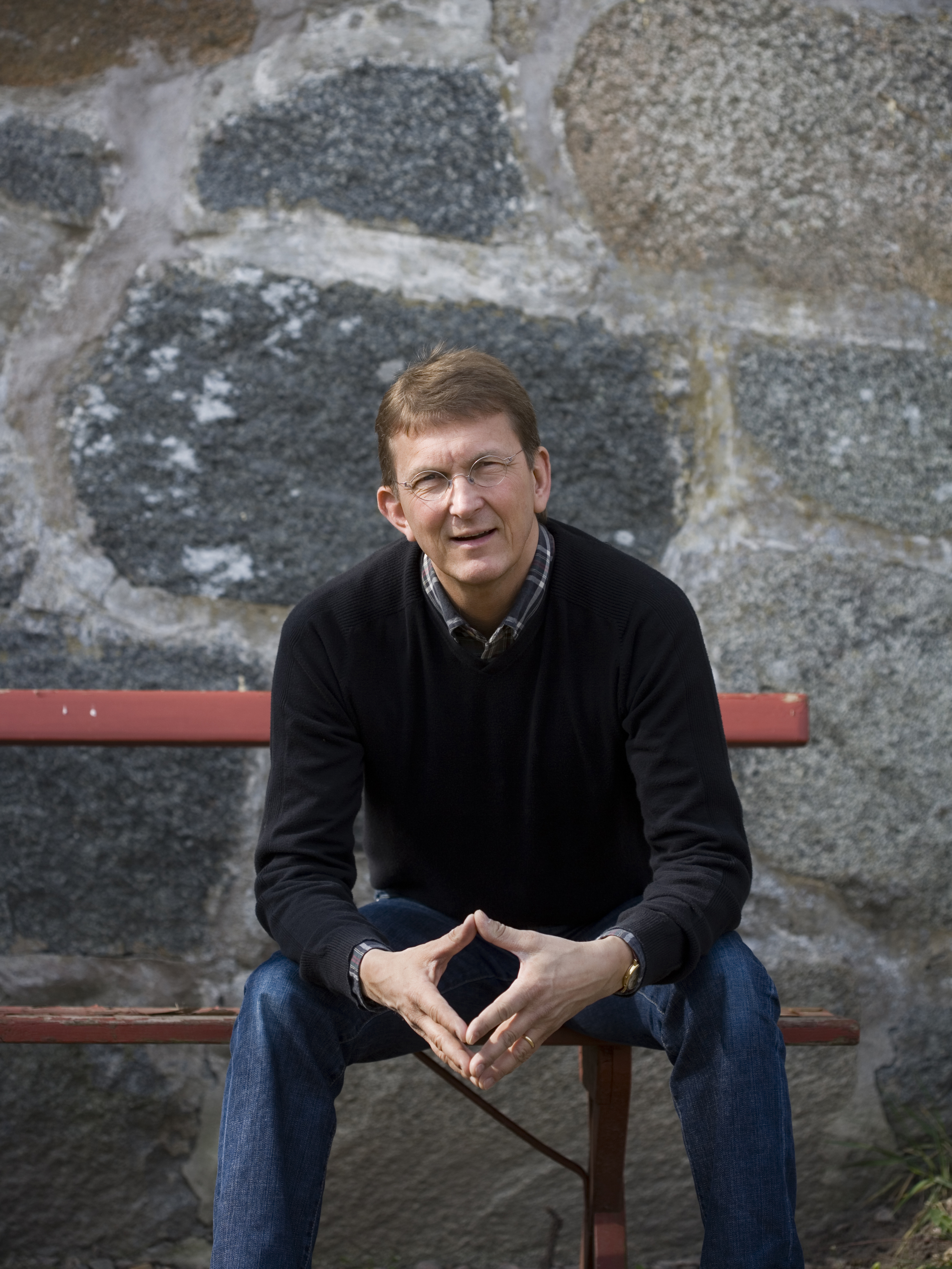 Tomas Sjödin, pastor, författare, föreläsare, flerfaldig sommar- och vinterpratare